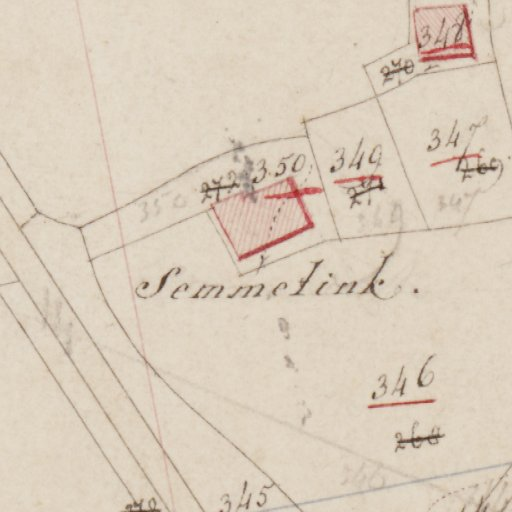 Uitsnede van een kadasterkaart van het Ambt Doetinchem (Sectie D - Blad 02) met daarop het goed "Semmelink" te IJzevoorde.